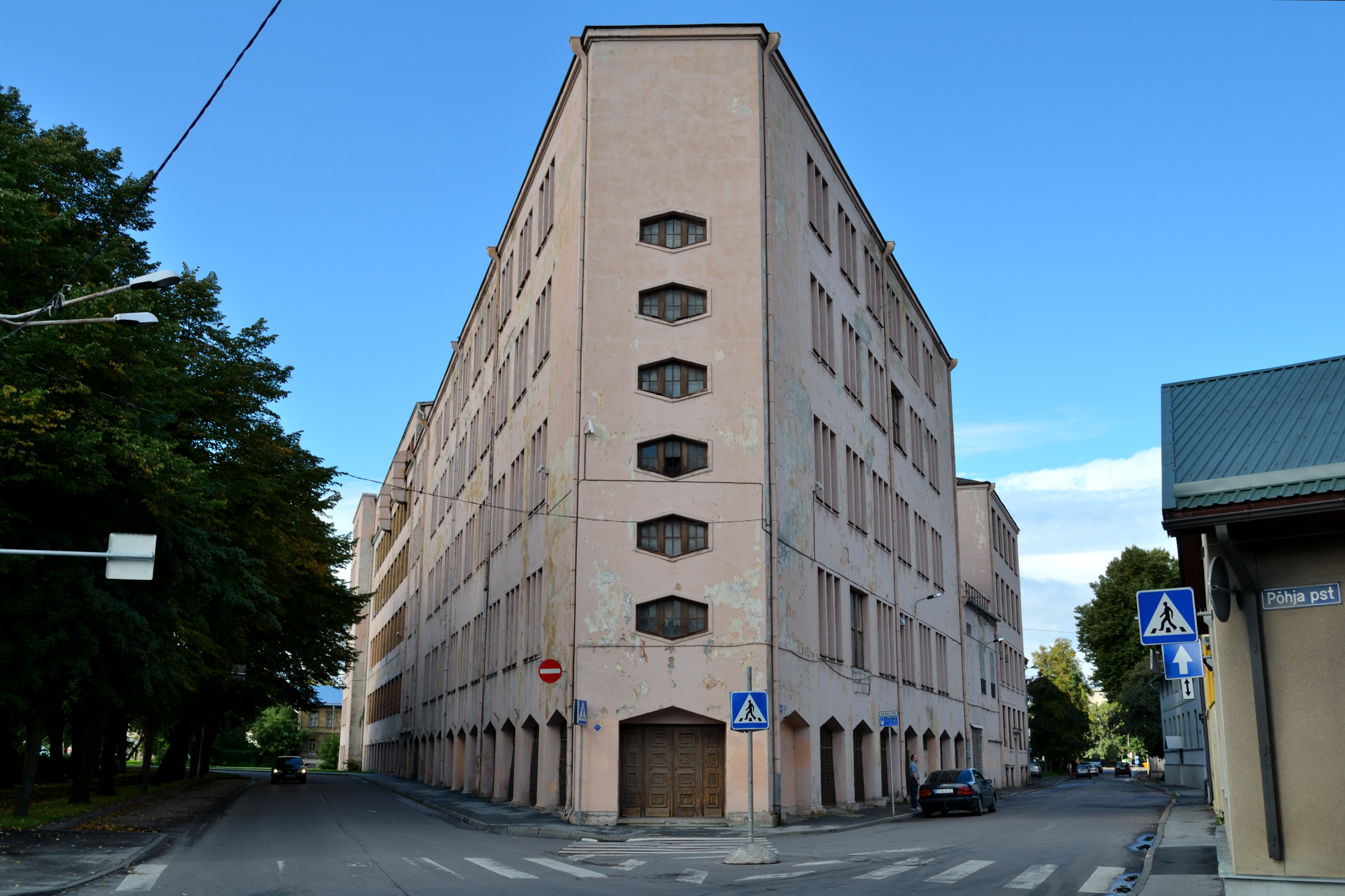 Tallinn, tehasehoone Põhja pst 7, 1932